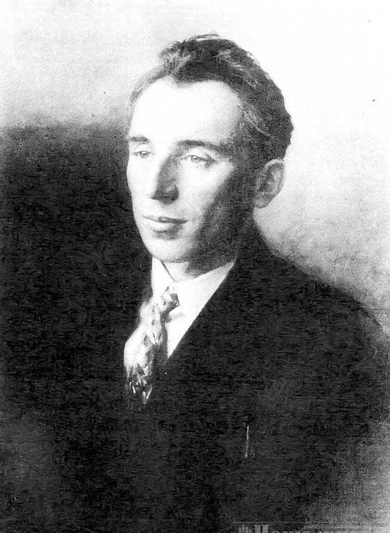 Петро Панч. Чорно-біла фотокопія портрету